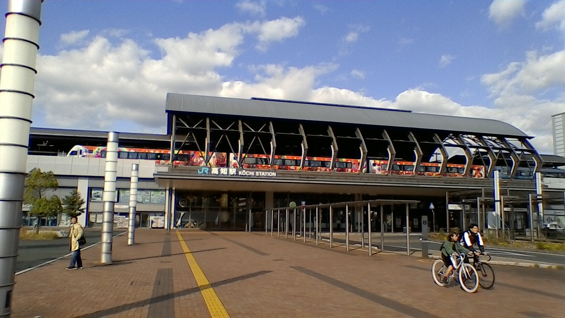 JR高知駅の南駅前広場より撮影（平成２８年１１月）